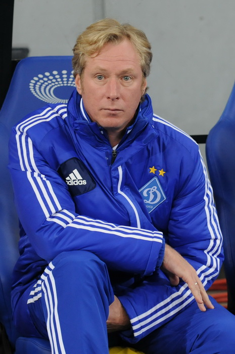 Oleksiy Mykhaylychenko